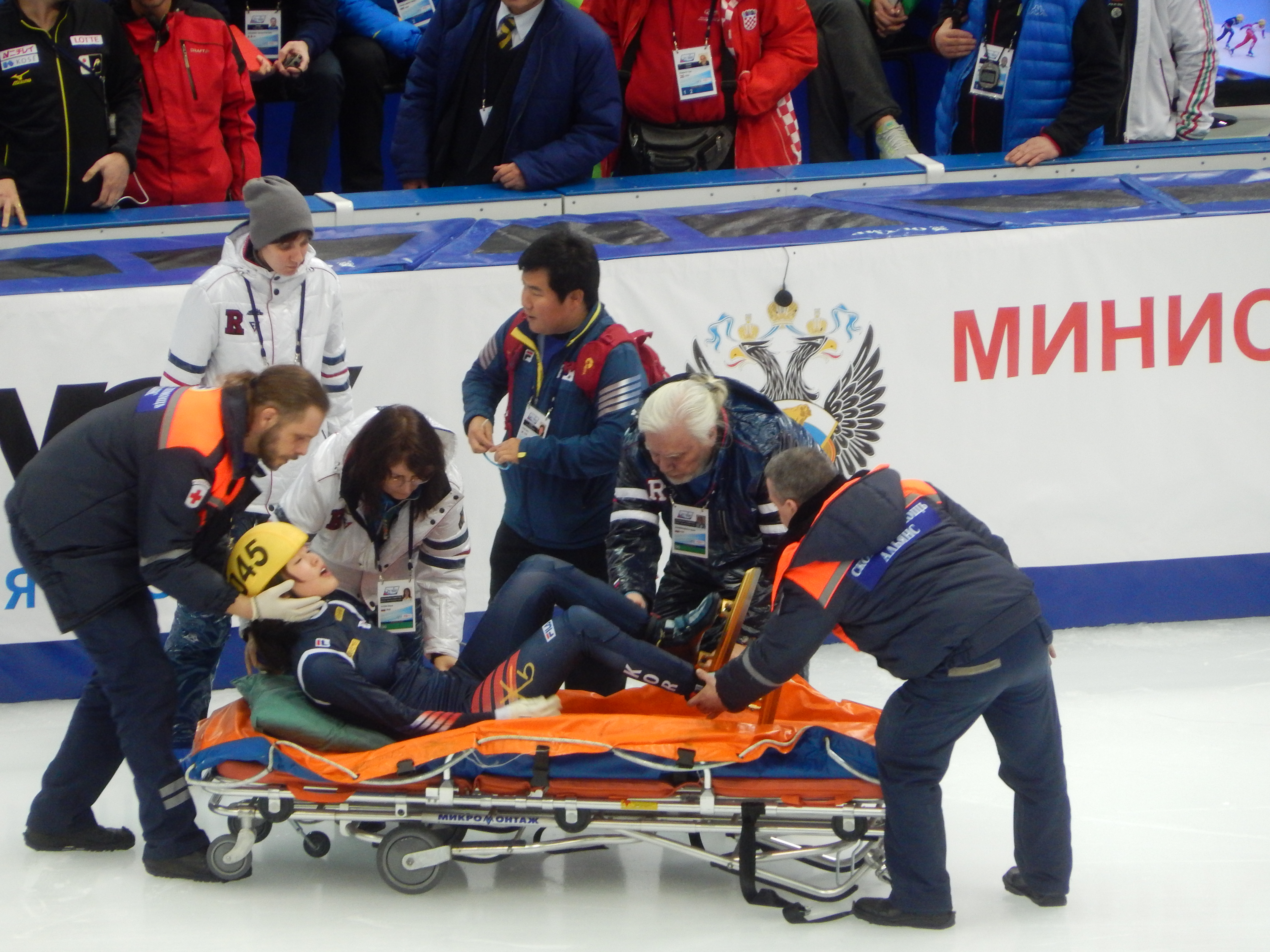 Чемпионат мира по шорт-треку 2015 в Москве Квалификационный раунд, 3 забег, 1000 м, Женщины Ким А Ран